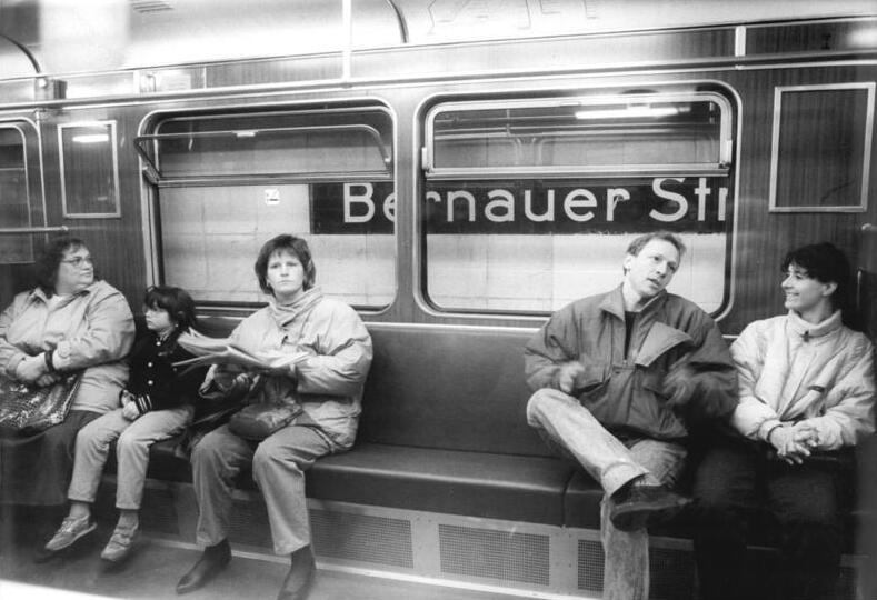 ADN-Uhlemann/ 12.4.90-Berlin: Mit Hilfe Westberliner Betriebe und des Wohnungsbaukombinates wurde es möglich, per 12.4. die U-Bahn-Station Bernauer Strasse für den innerstädtischen Verkehr wieder zu eröffnen, sie ist allerdings nur von Westberliner Seite aus zugänglich.